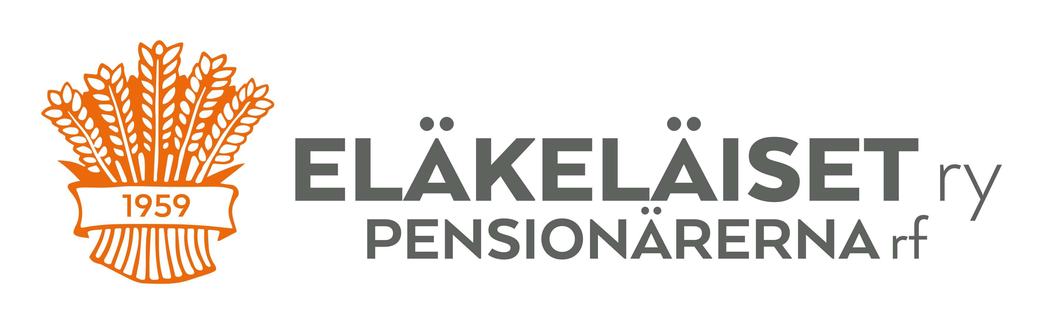 Eläkeläiset ry:n logo